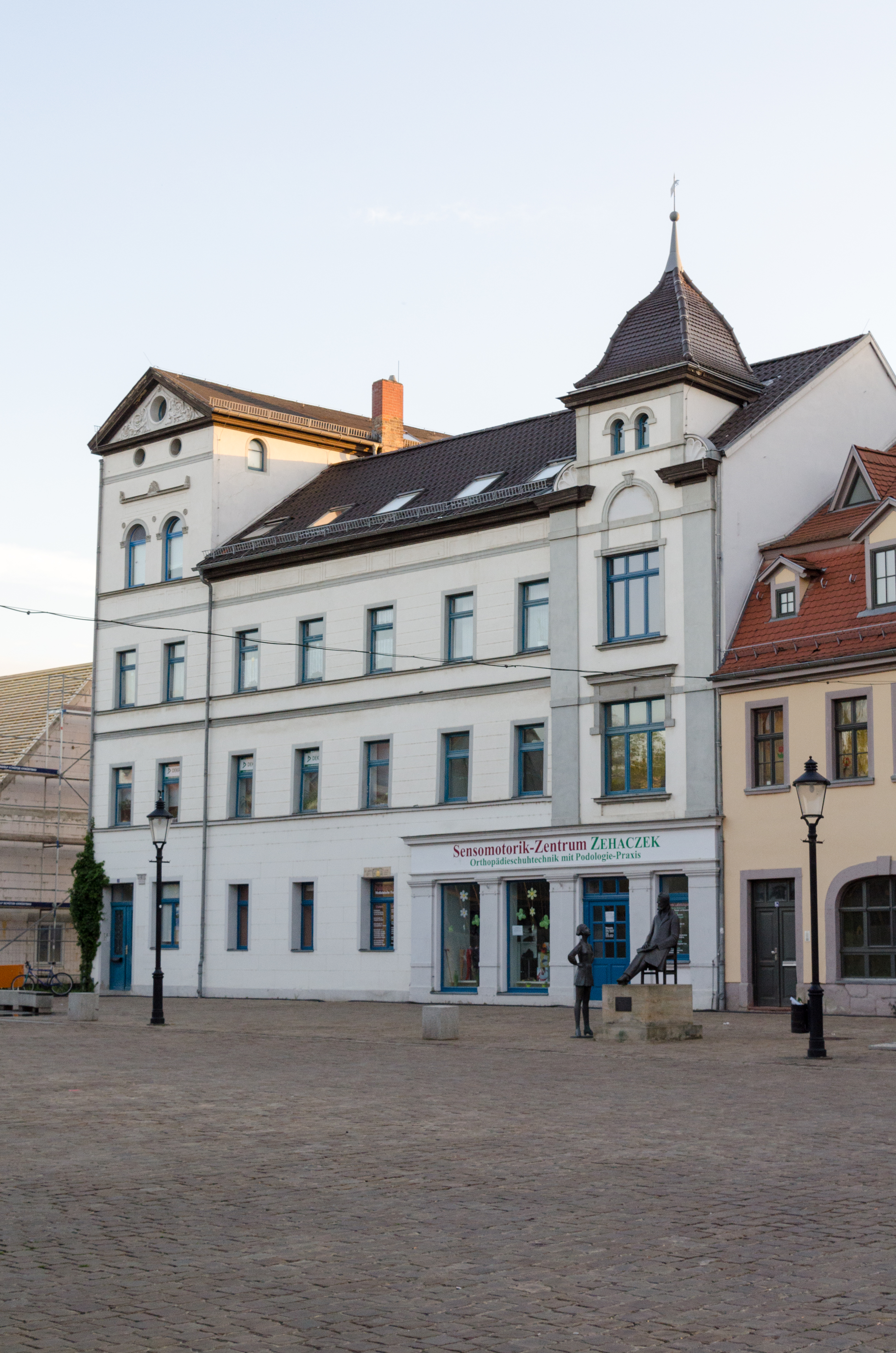 Naumburg, Holzmarkt 3